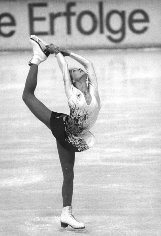 Constanze Gensel ADN-ZB Thieme 17.12.1983 Karl-Marx-Stadt: DDR-Meisterschaften der Eiskunstläufer.- Die 14-jährige Constanze Gensel (SC Karl-Marx-Stadt) gewann bei den Meisterschaften, die am 16.12.1983 zu Ende gingen, die Bronzemedaille im Wettstreit der Damen.